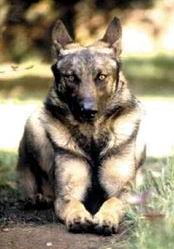 lupo italiano